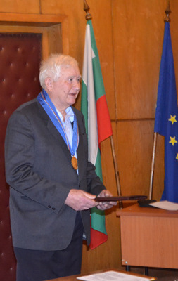 Връчване на Почетен знак със синя лента на Софийския университет на проф. д-р Ангел Велчев